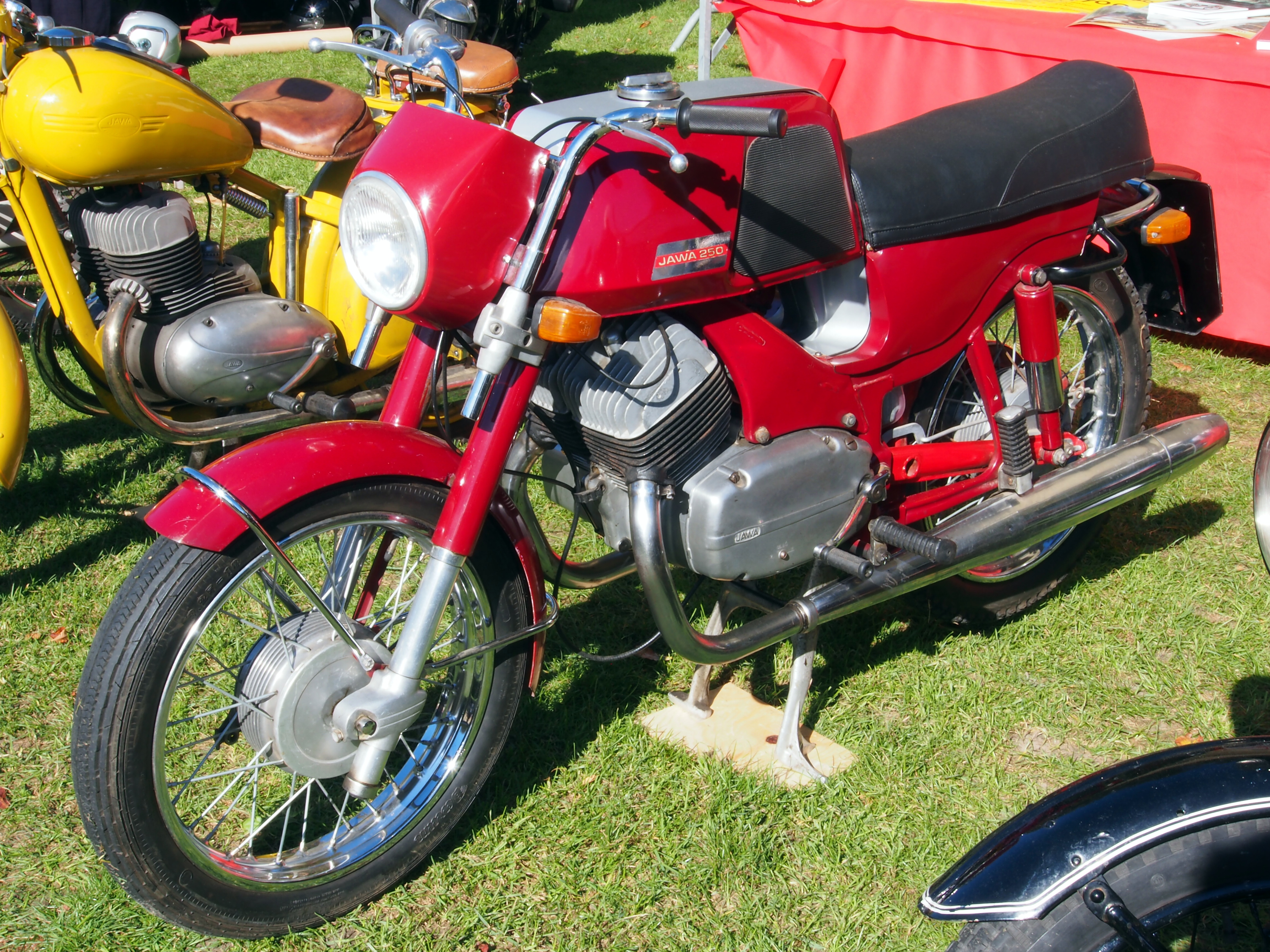 Red Jawa 250.